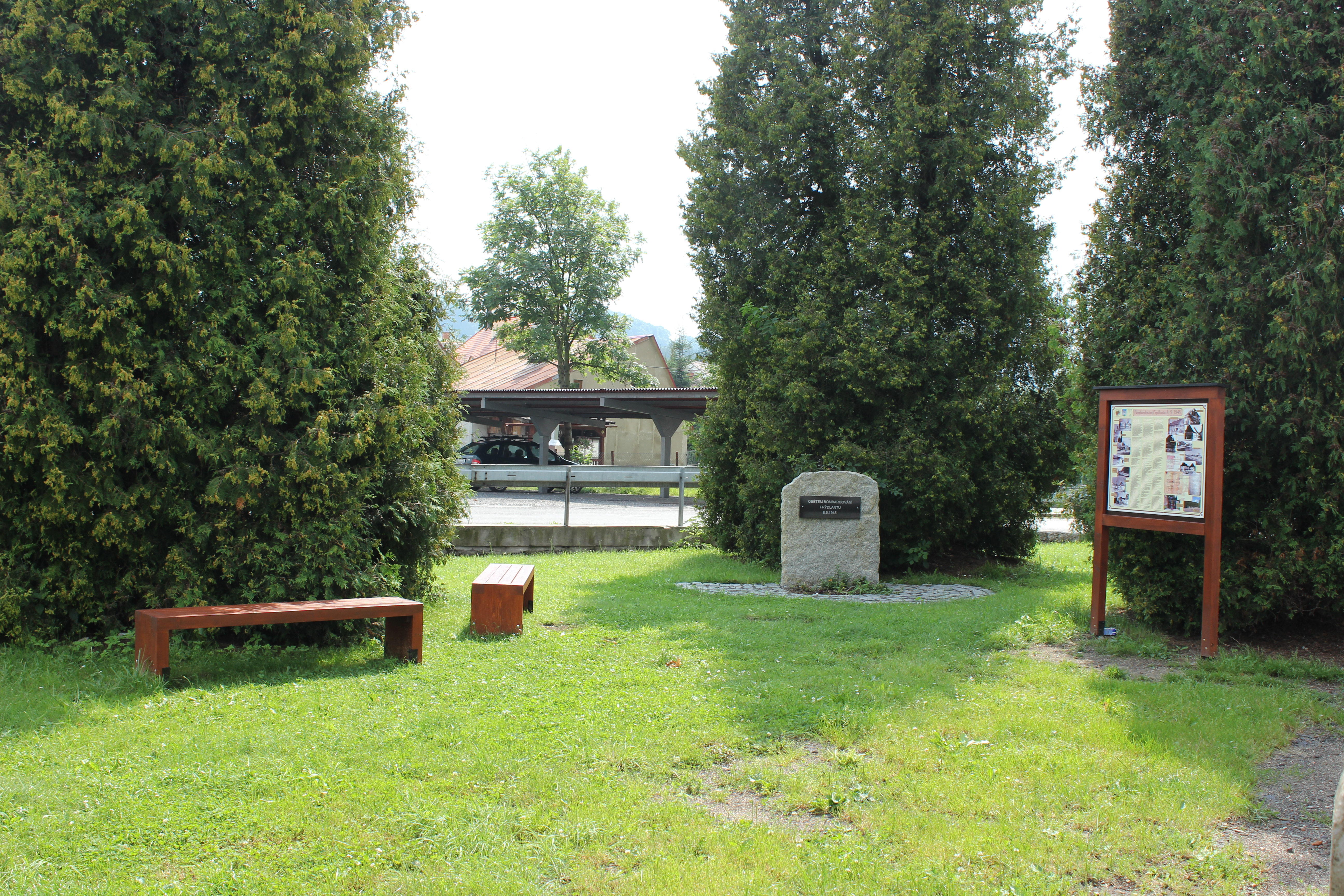 Památník obětem bombardování ve Frýdlantu. Je situován na křižovatce ulic U Potoka a Kodešova.